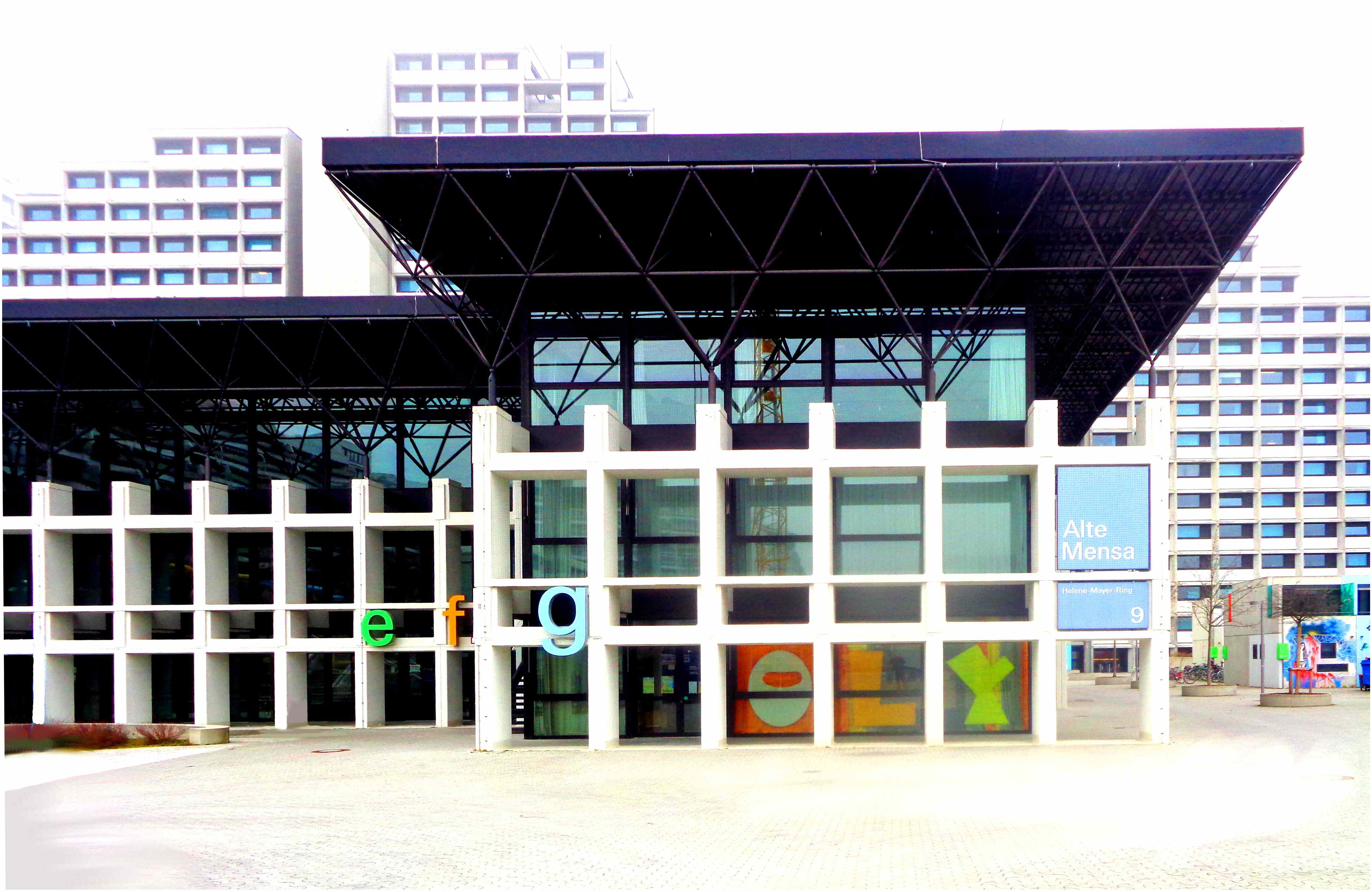 Mensa im Studentendorf, München, heute "Alte Mensa", Bausatzverfahren, Dachkonstruktion: Mero-Tragwerk